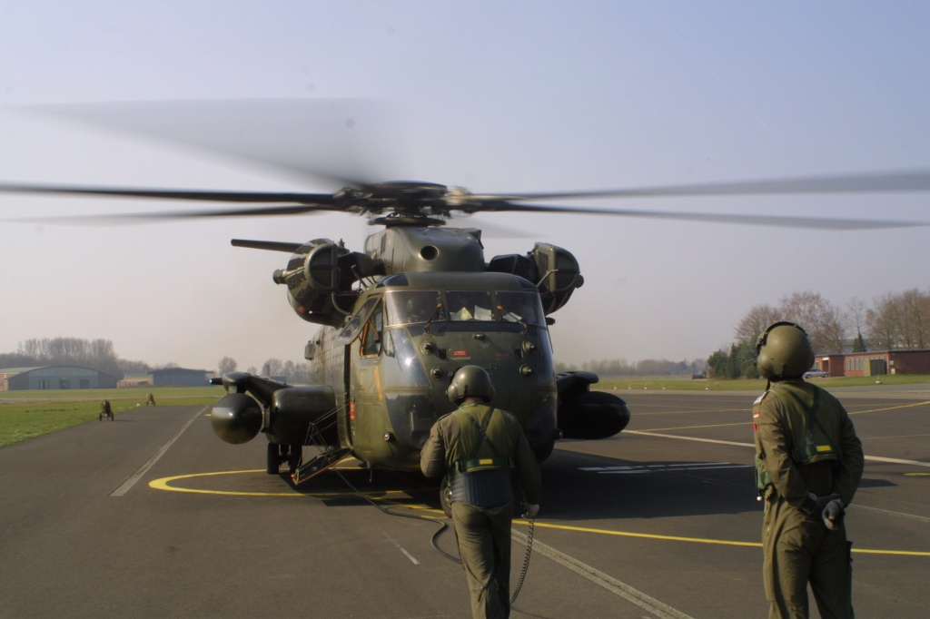 Vor dem Flug: Bordwarte kontrollieren die CH-53